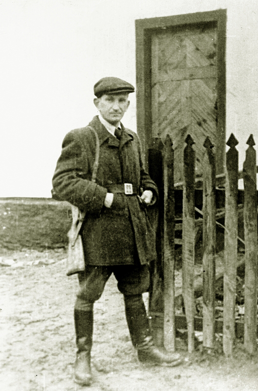 Роман Шухевич. Село Будераж, Рівненська обл.